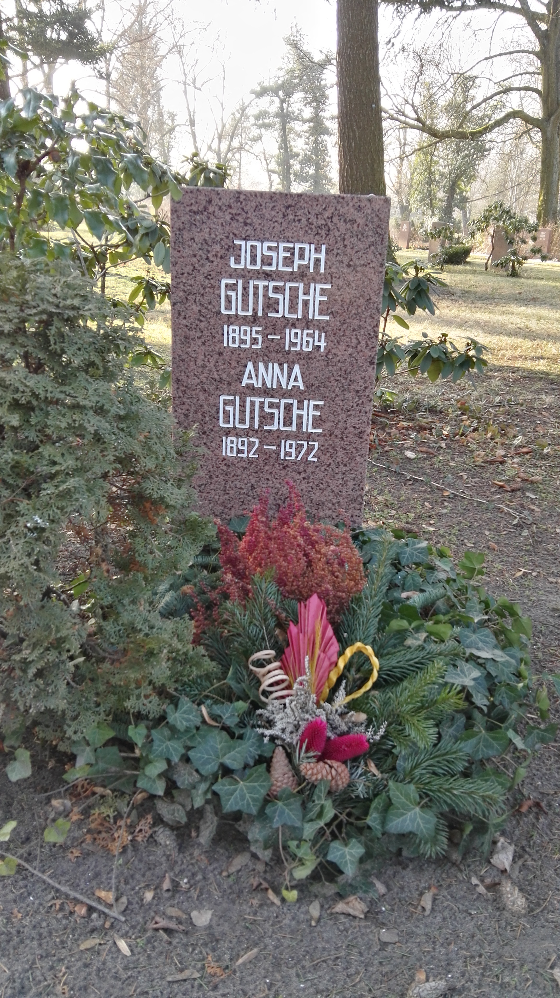 Grab von Joseph Gutsche und Anna Gutsche in der Grabanlage Pergolenweg auf dem Sozialistenfriedhof des Zentralfriedhofs Friedrichsfelde